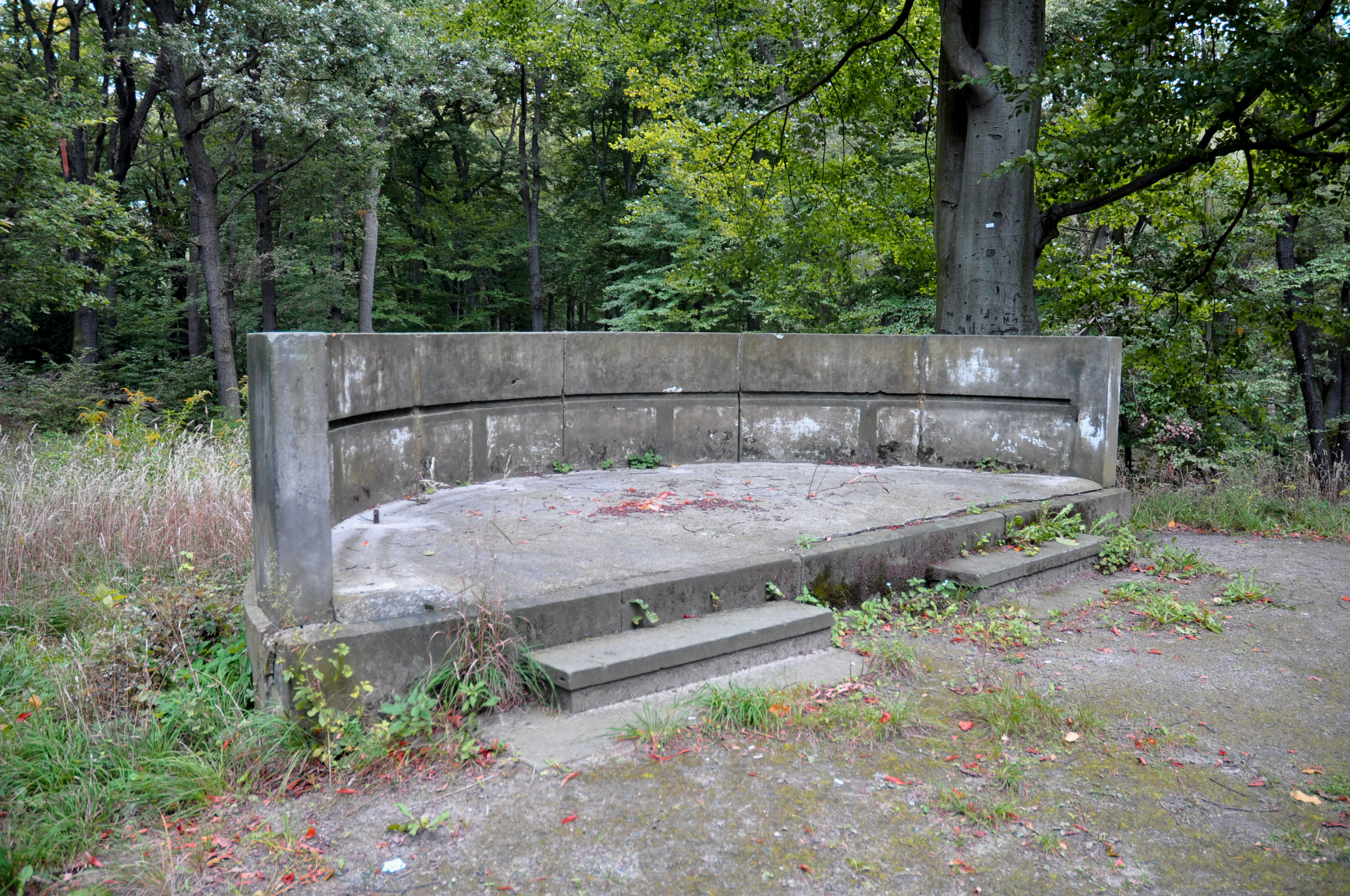 Die Römische Bank im Park von Klein-Glienicke